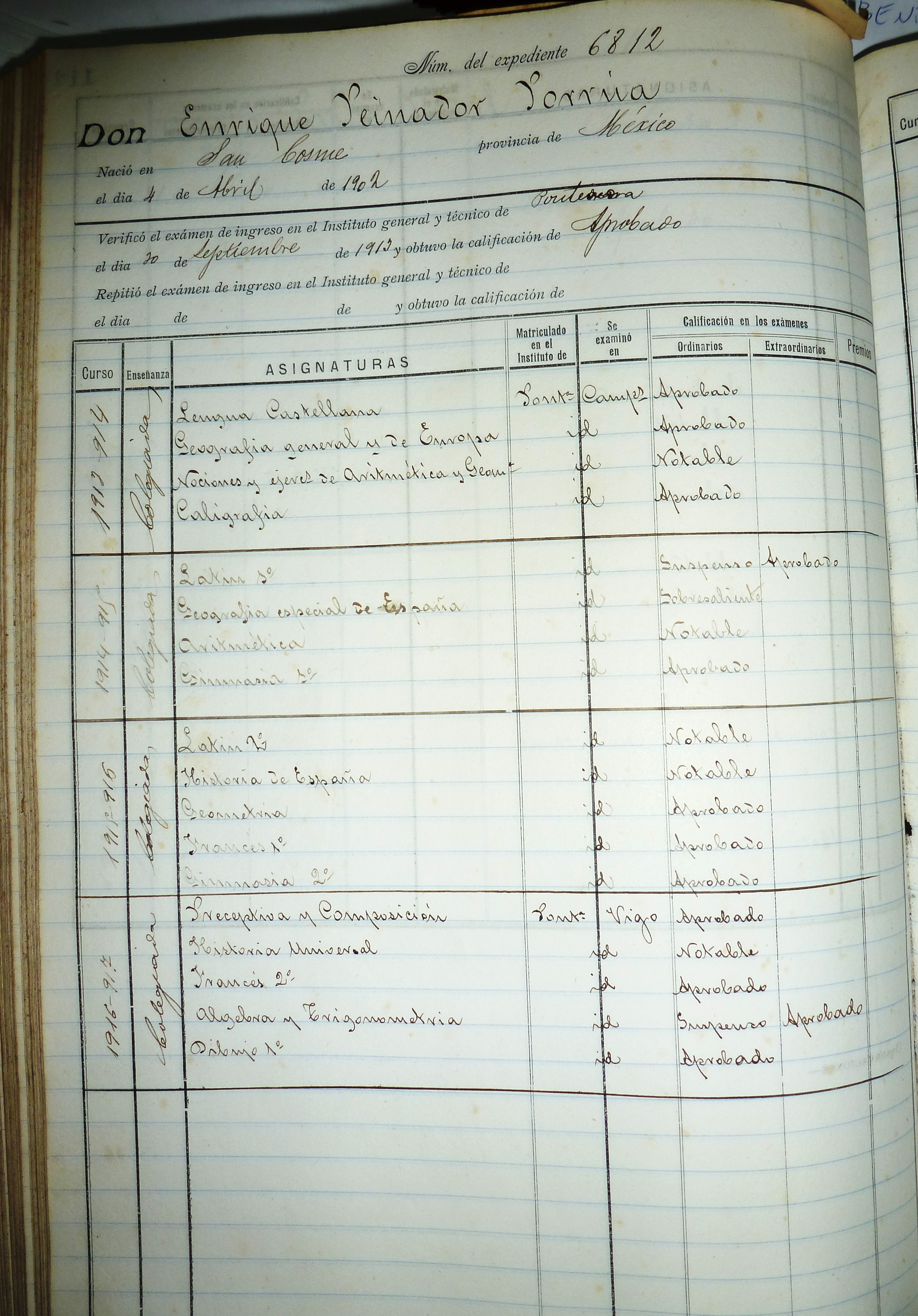 Enrique Peinador Porrúa